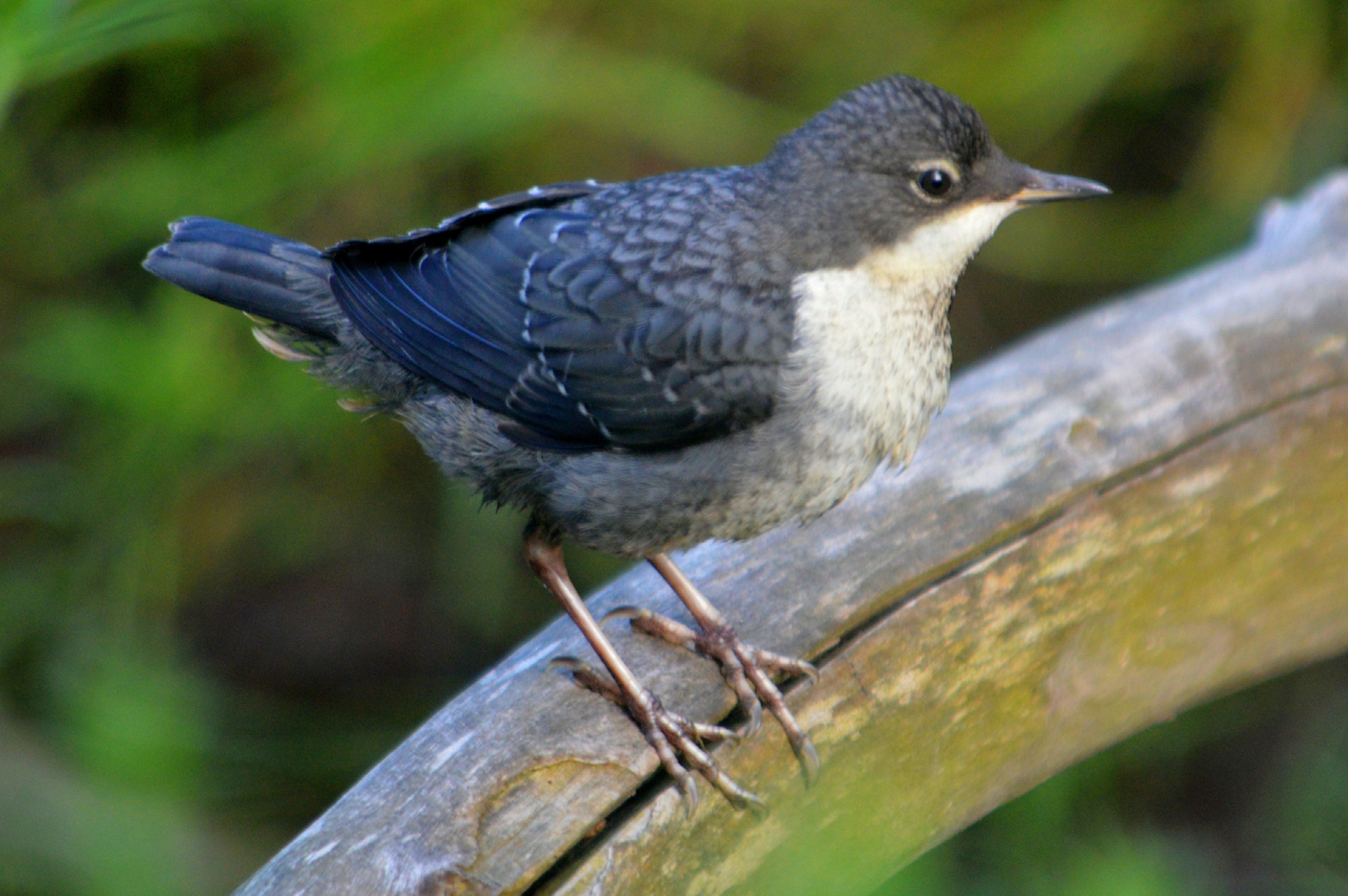 FFH Beuster - Wasseramsel (7)